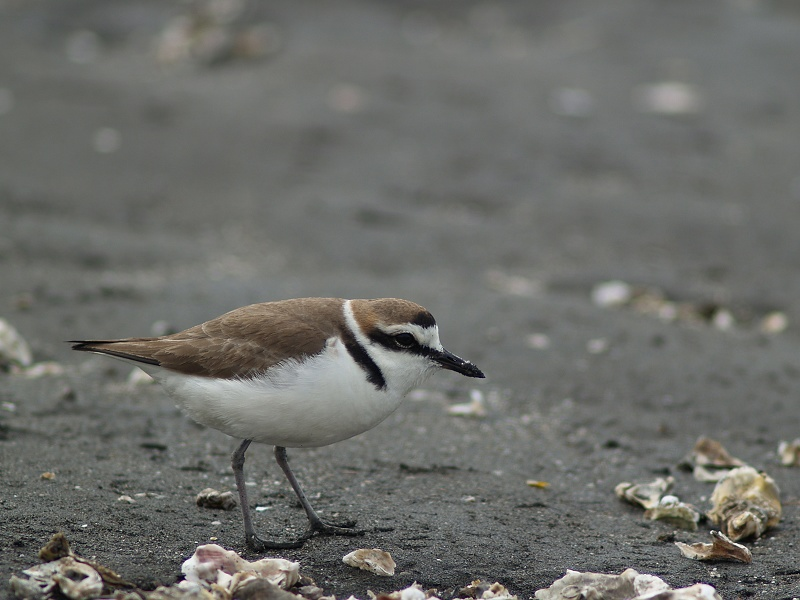 Charadrius alexandrinus 東方環頸鴴